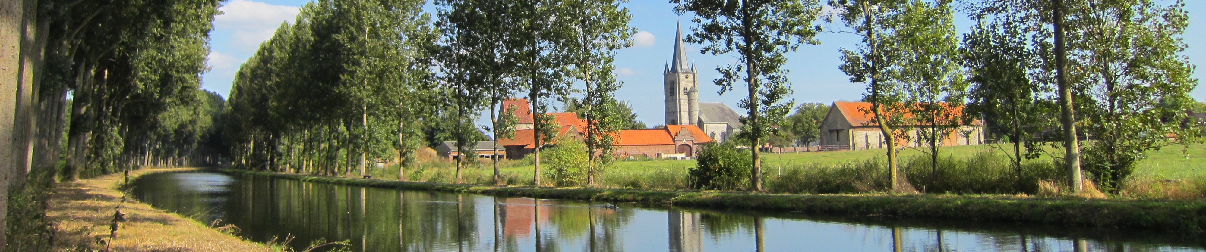 Le village de Saint-Leger